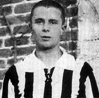 Ференц Хірцер у формі "Ювентуса"